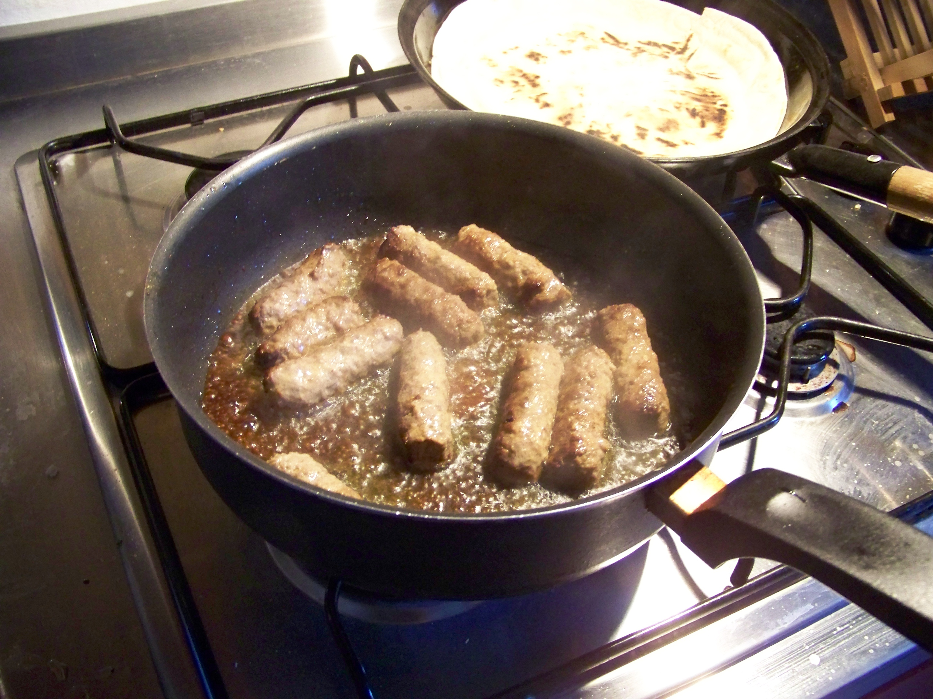 la preparazione di gustosi cevapi